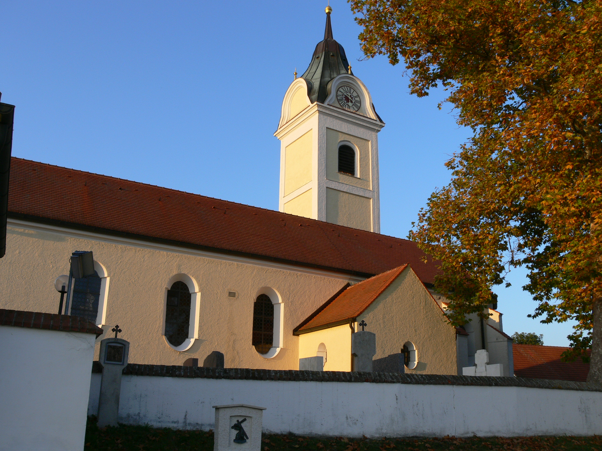 Ainhofen, Kirche St. Maria, Südseite